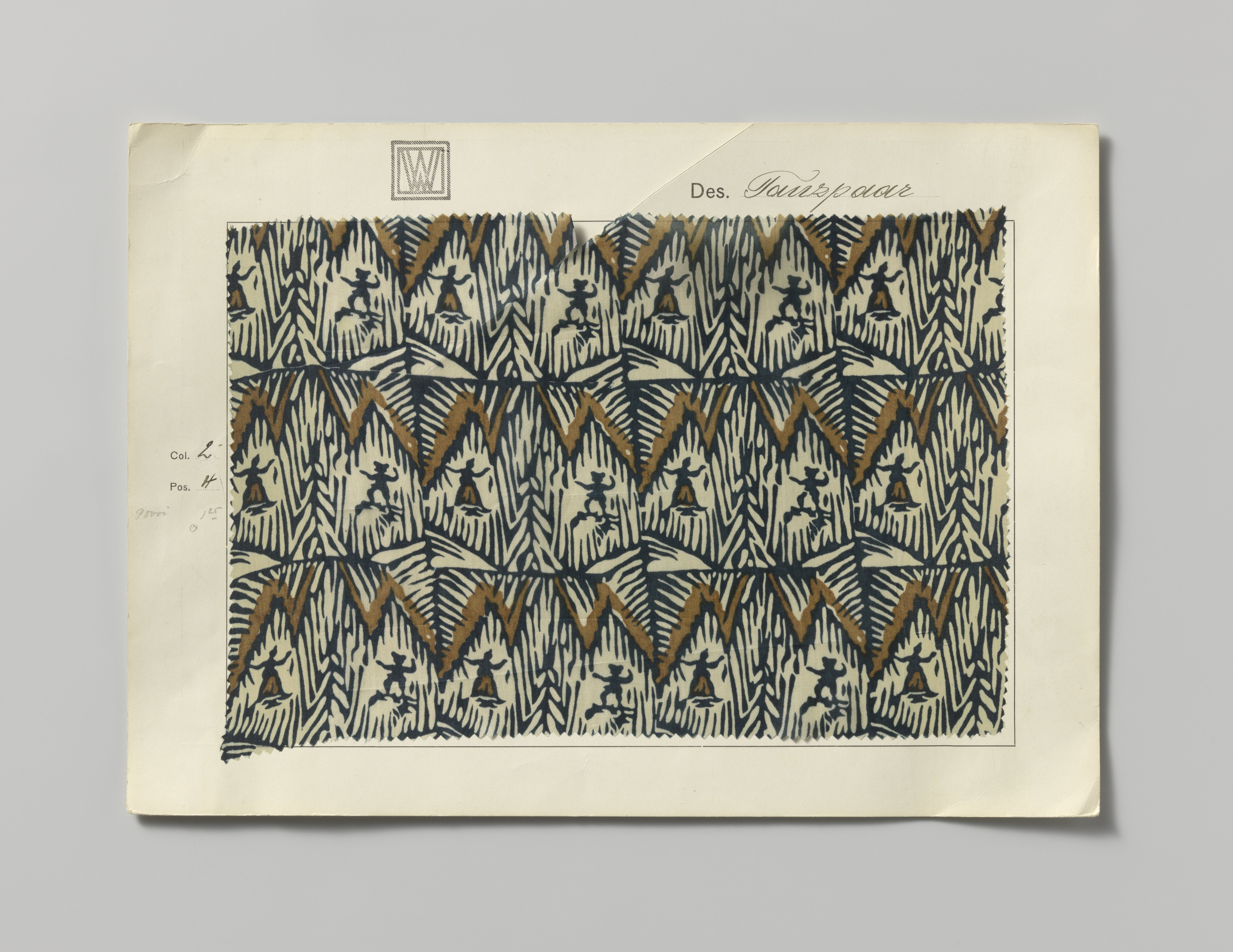 IdentificatieTitel(s): Staal met bedrukte zijde, dessin TanzpaarObjecttype: staal Objectnummer: BK-1995-34-I(R)Omschrijving: Staal met bedrukte zijde. Dessin Tanzpaar, WW nr. 00551. Op naturel fond zigzaglijnen in bruin en zwarte arceringen Waar: binnen dansende figuren. De staal is op karton gelijmd waarop het vignet van de Wie: ner Werkstätte. Op de achterzijde een kleurvariant met roze en zwart.VervaardigingVervaardiger: Wiener Werkstätteontwerper: Heddi Hirsch-LandesmanPlaats vervaardiging: WenenDatering: 1915Fysieke kenmerken: bedrukte zijde op kartonMateriaal: zijde karton Techniek: effenbinding / blokdrukAfmetingen: karton: h 25 cm. × b 35 cm. zijde: h 19,4 cm. × b 28,1 cm. Verwerving en rechtenVerwerving: aankoop 1995Copyright: Publiek domein